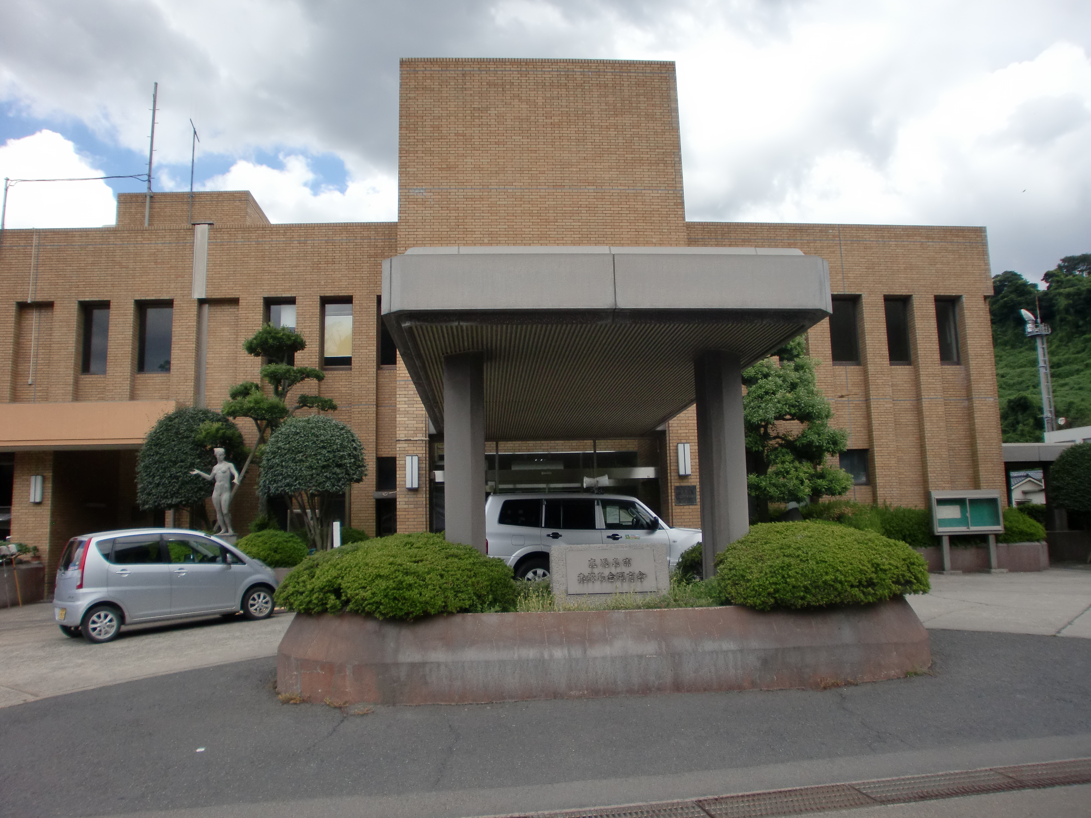 鹿児島市役所東桜島支所の外観。合同庁舎となっている。